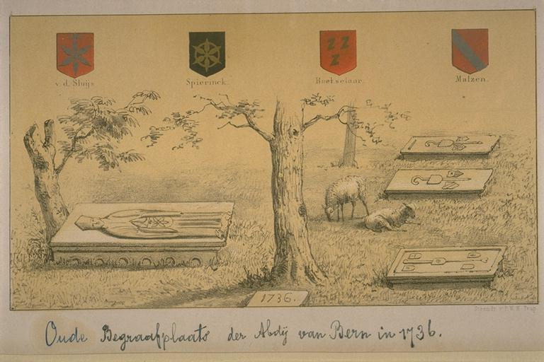 Oude pentekening van de begraafplaats van de Abdij van Berne in Bern 1736